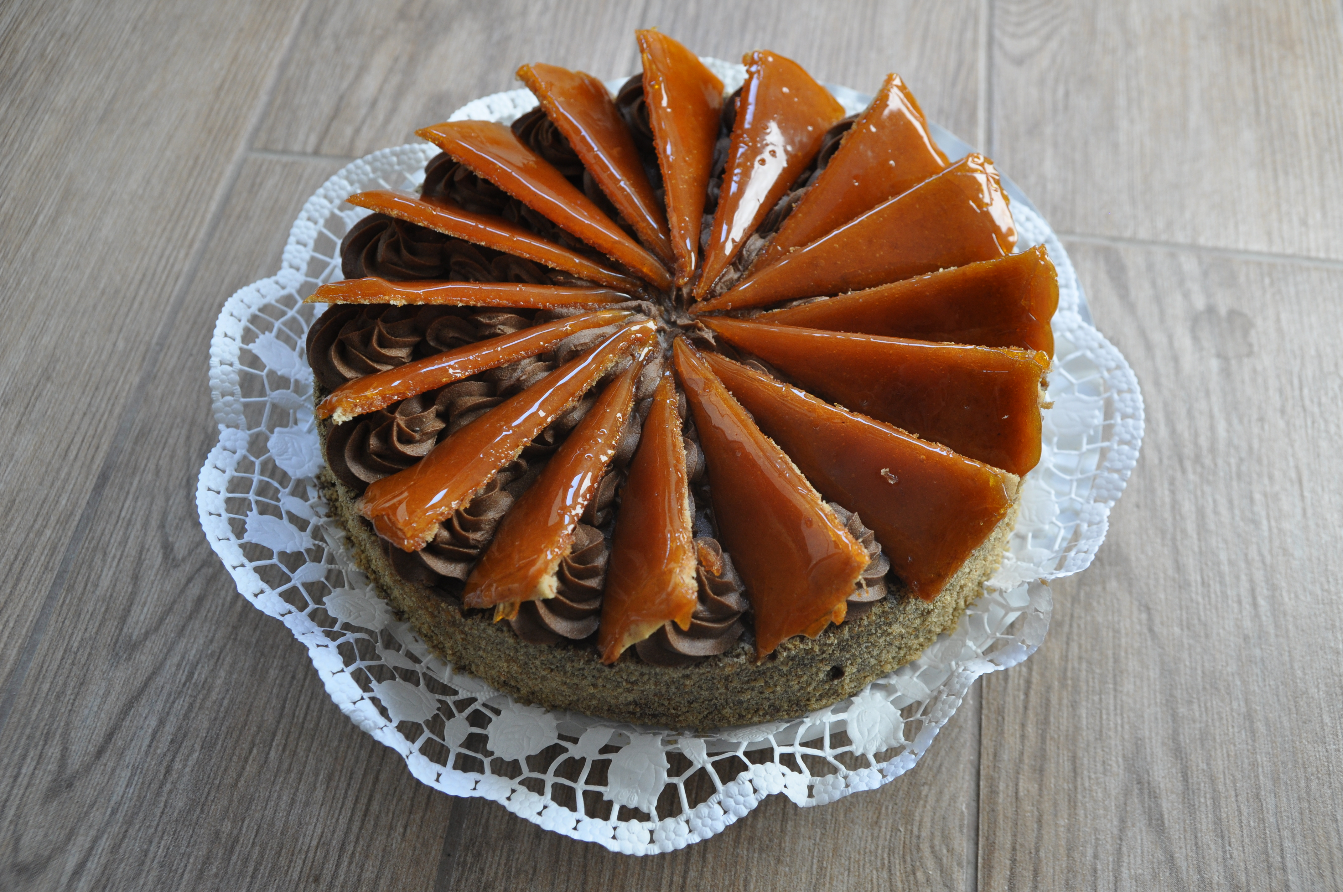 Budapest, Napfényes Cukrászat, Dobos torta